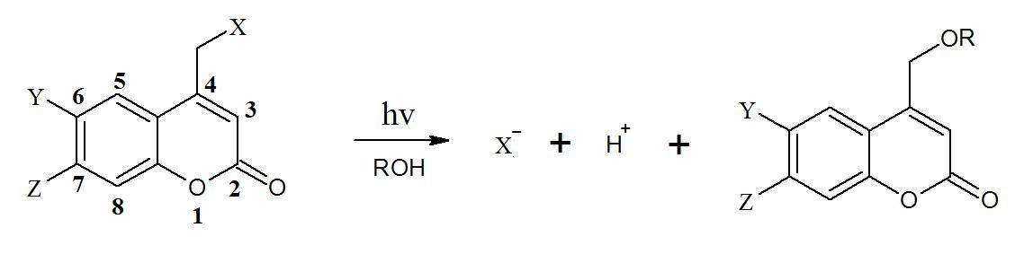 Kumariini e. bensoe-α-pürooni lagunemise skeem UV valgusega kiiritamise toimel.